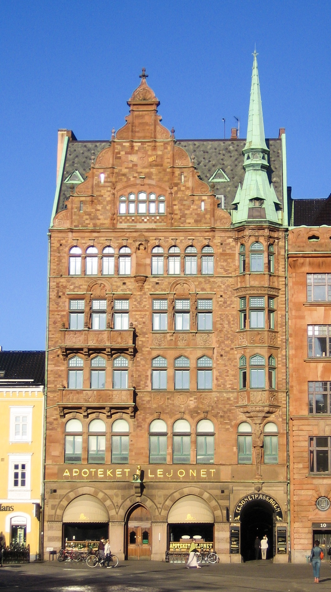 Apoteket Lejonet och Lejonetpassagen, Teschska huset, Stortorget 8 i Malmö.